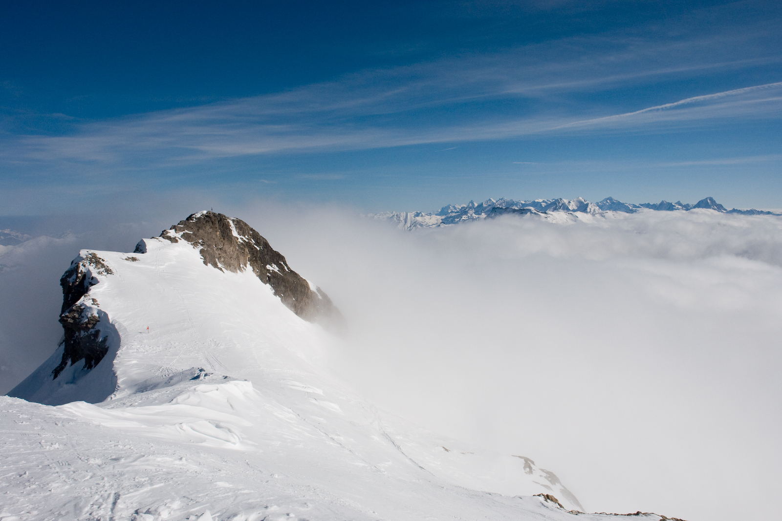 Das Wildhorn